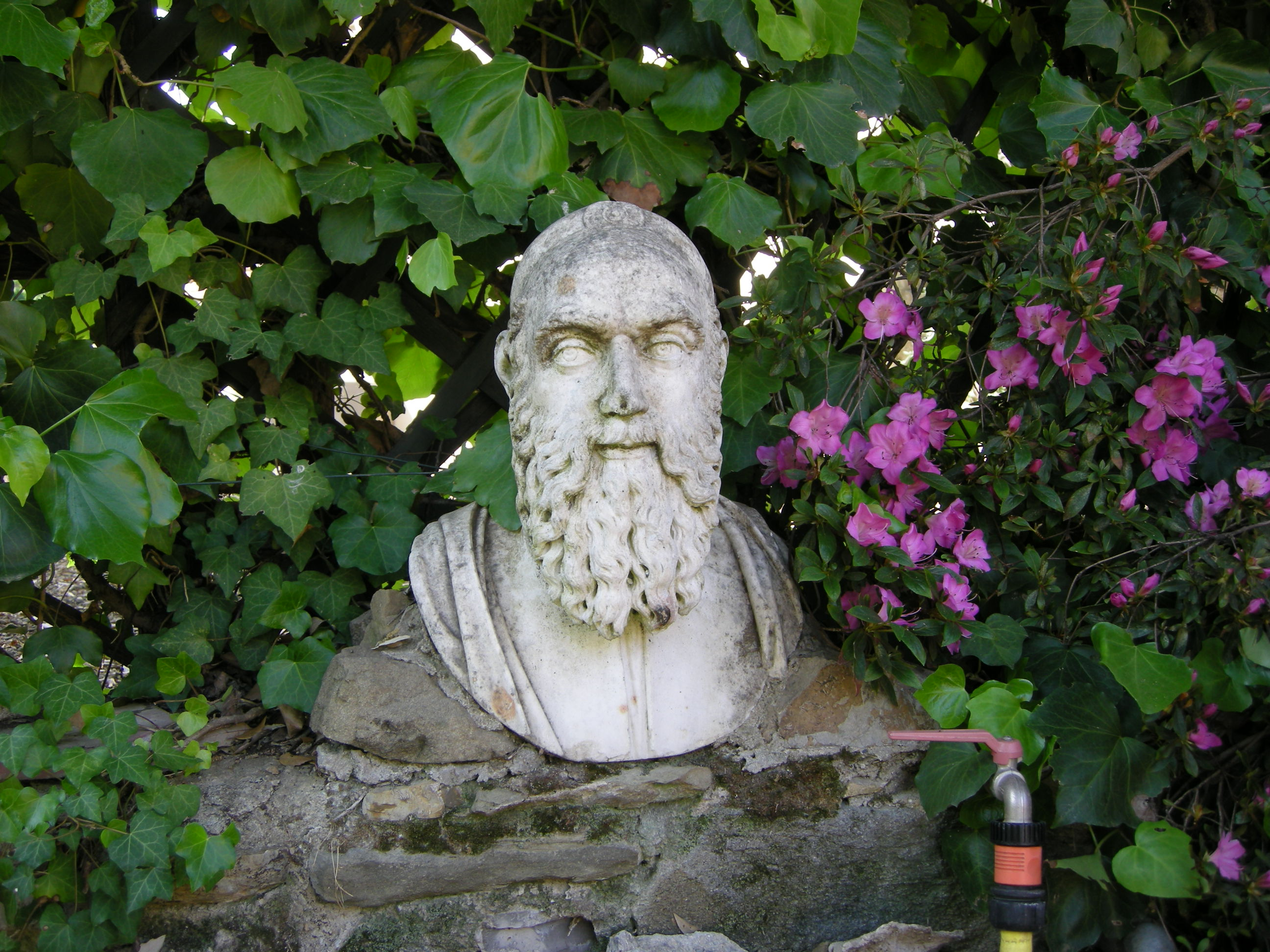 Villa i tatti, terrazza ovest, fontanella con testa di bindo altoviti